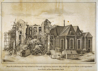 Berlin, Gendarmenmarkt, Nach dem Einsturz des Turmes der sich im Bau befindlichen Neuen Kirche 1781